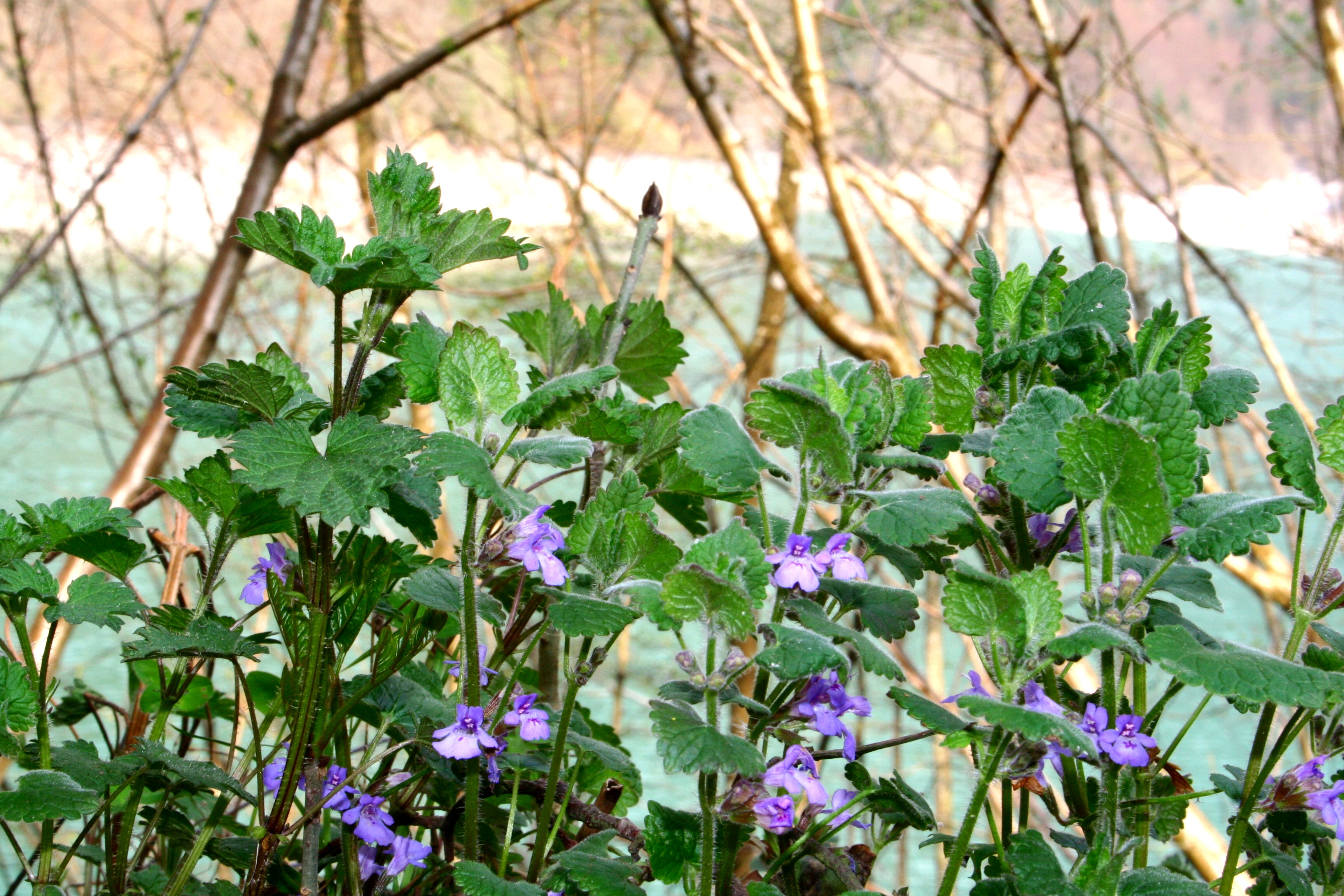 Glechoma_hederacea (Ellera terrestre comune Località: Valle di Canzoi, Cesiomaggiore(BL),696 m s.l.m.